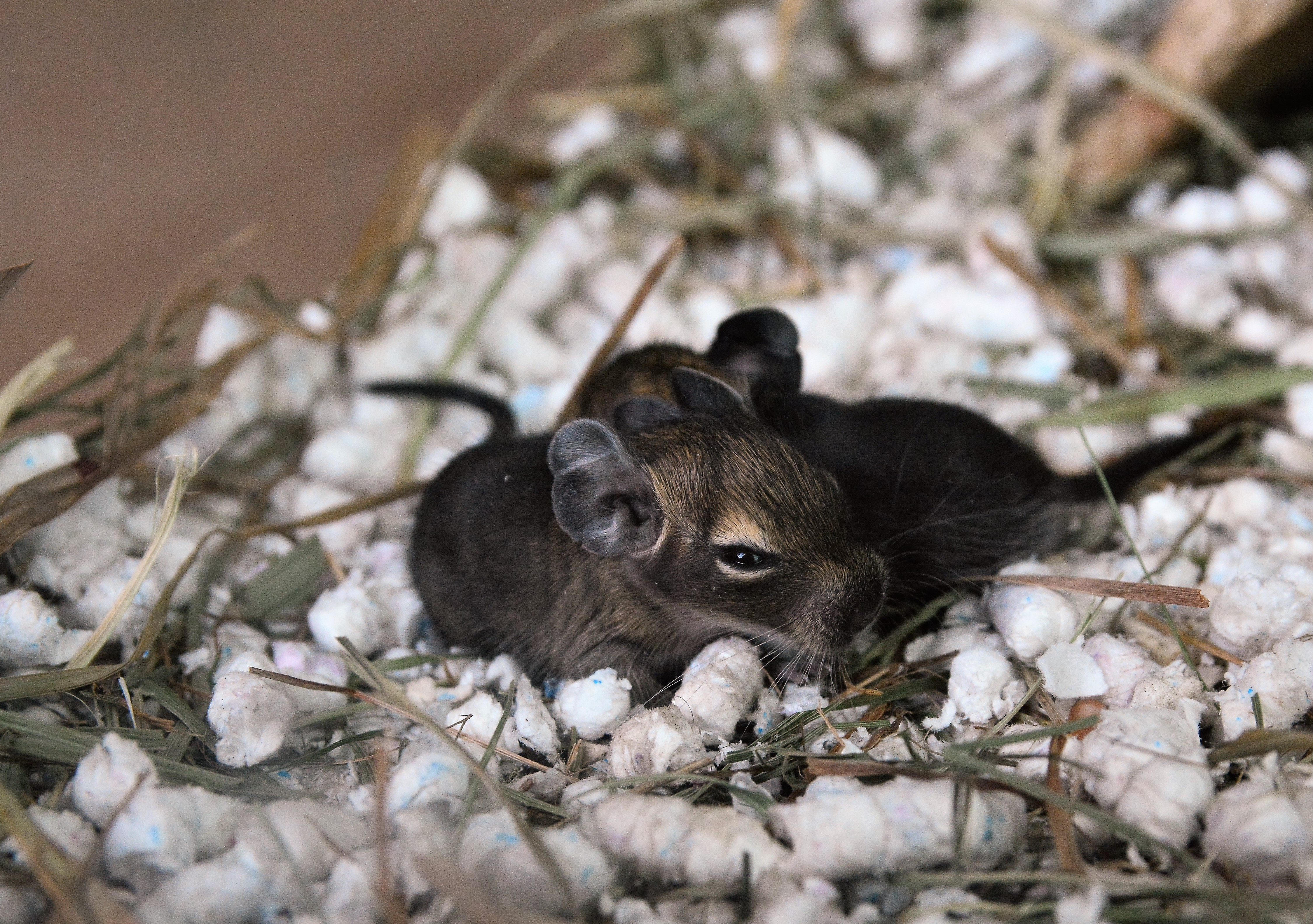 2 dny starý osmáček